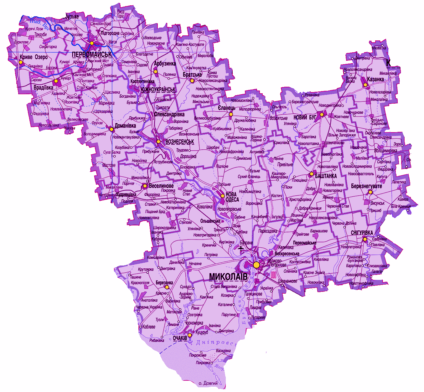 Mykolajivská oblast